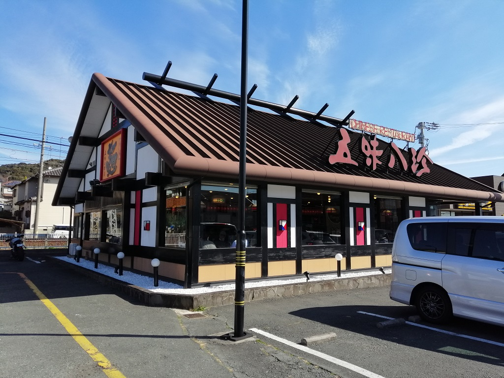 五味八珍（豊川店）